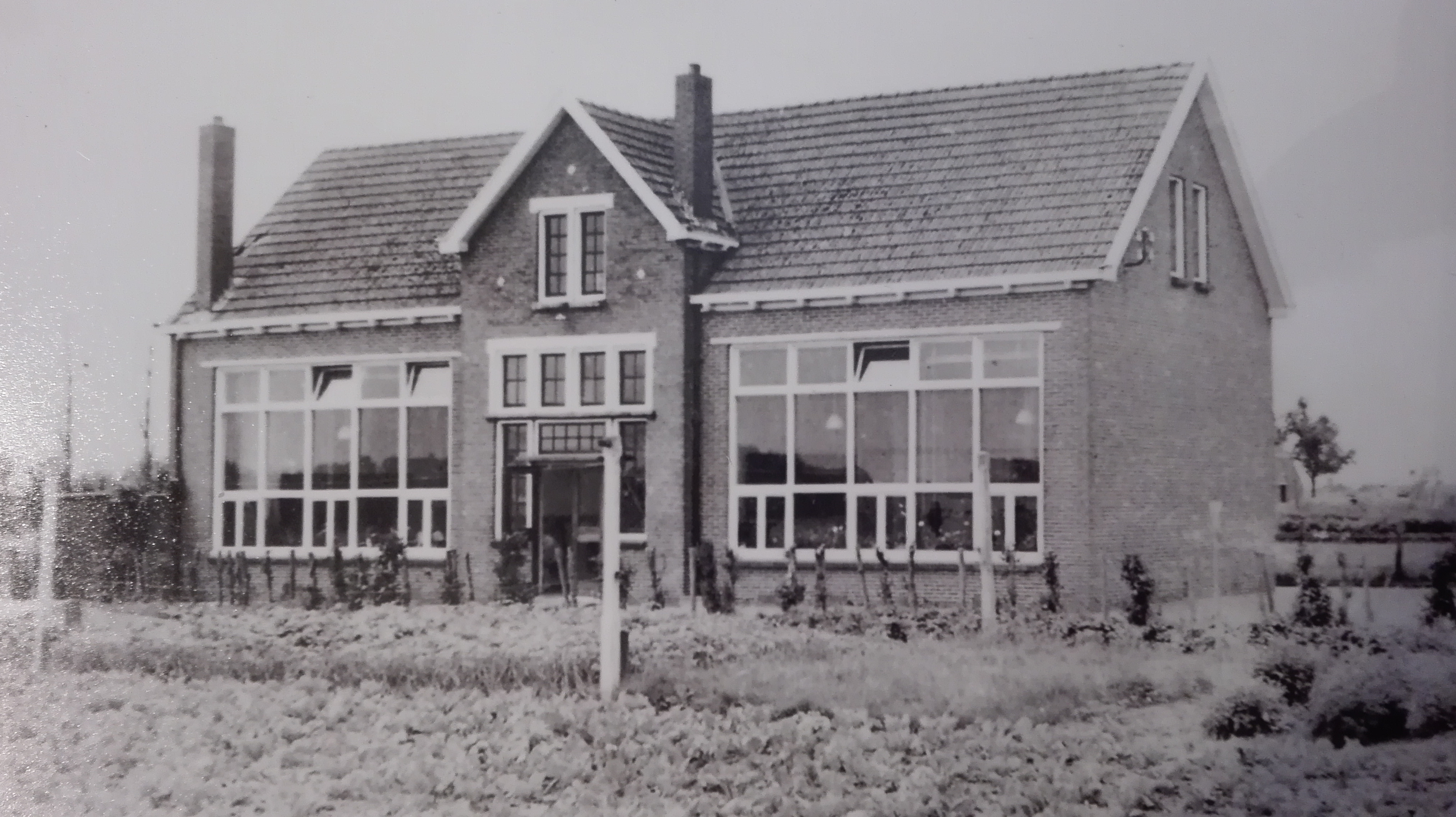 Voormalig Gereformeerde Lagere School te Oudeschip. Schoolhoofd toentertijd Binne Roorda. Later Openbare Lagere School. Tegenwoordig dorpshuis.